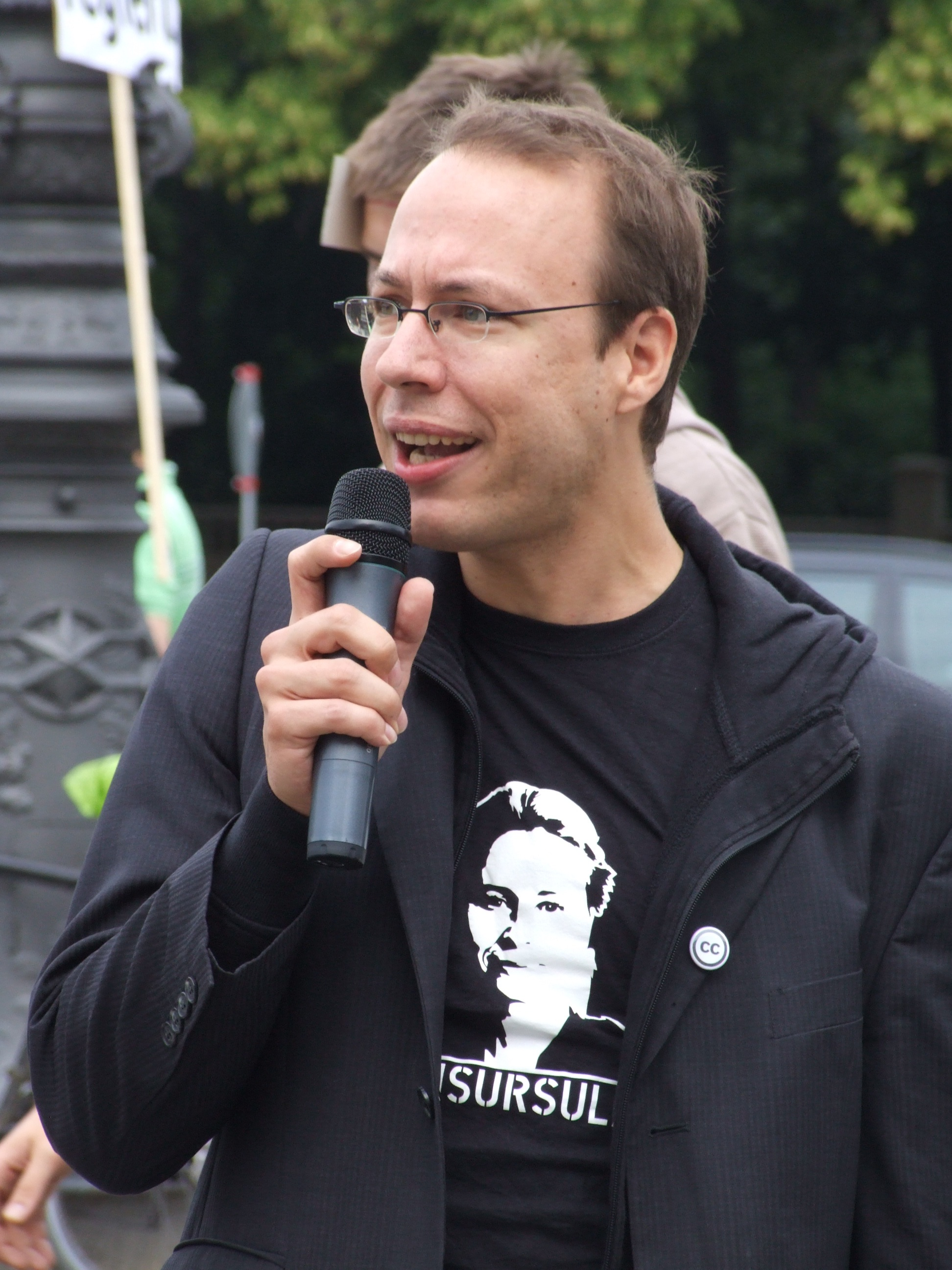 Mahnwache am 18. Juni 2009 zwischen 9.00 und 10.00 vor dem Brandenburger Torgegen das Internet-Sperrgesetz.